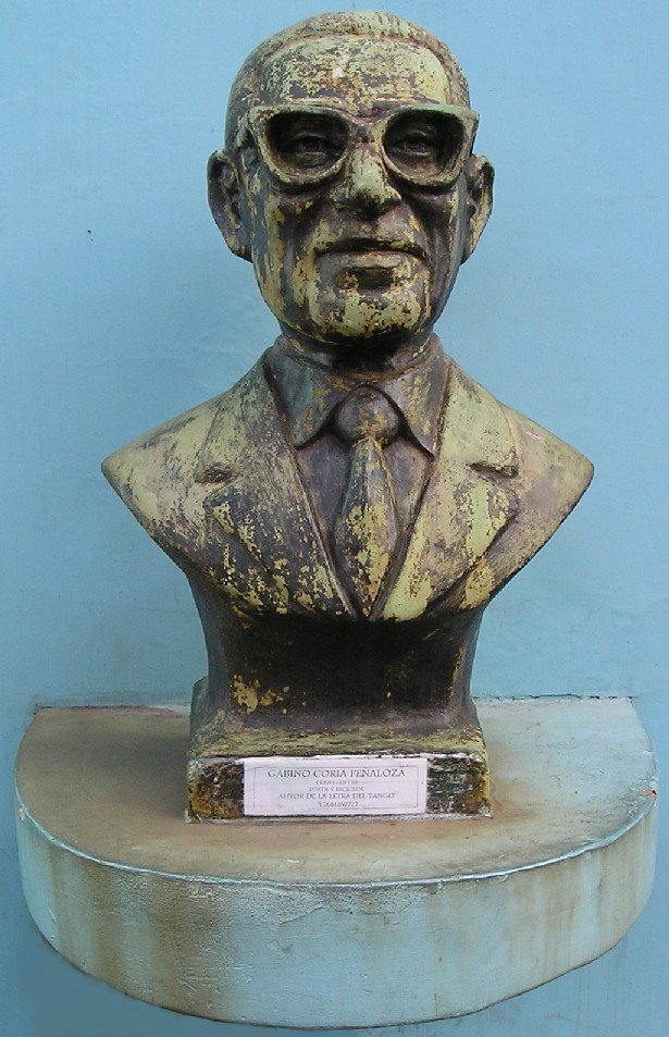 Busto de Gabino Coria Peñaloza, del escultor Euzer Díaz. Ubicado en Caminito, La Boca, Buenos Aires, Argentina.